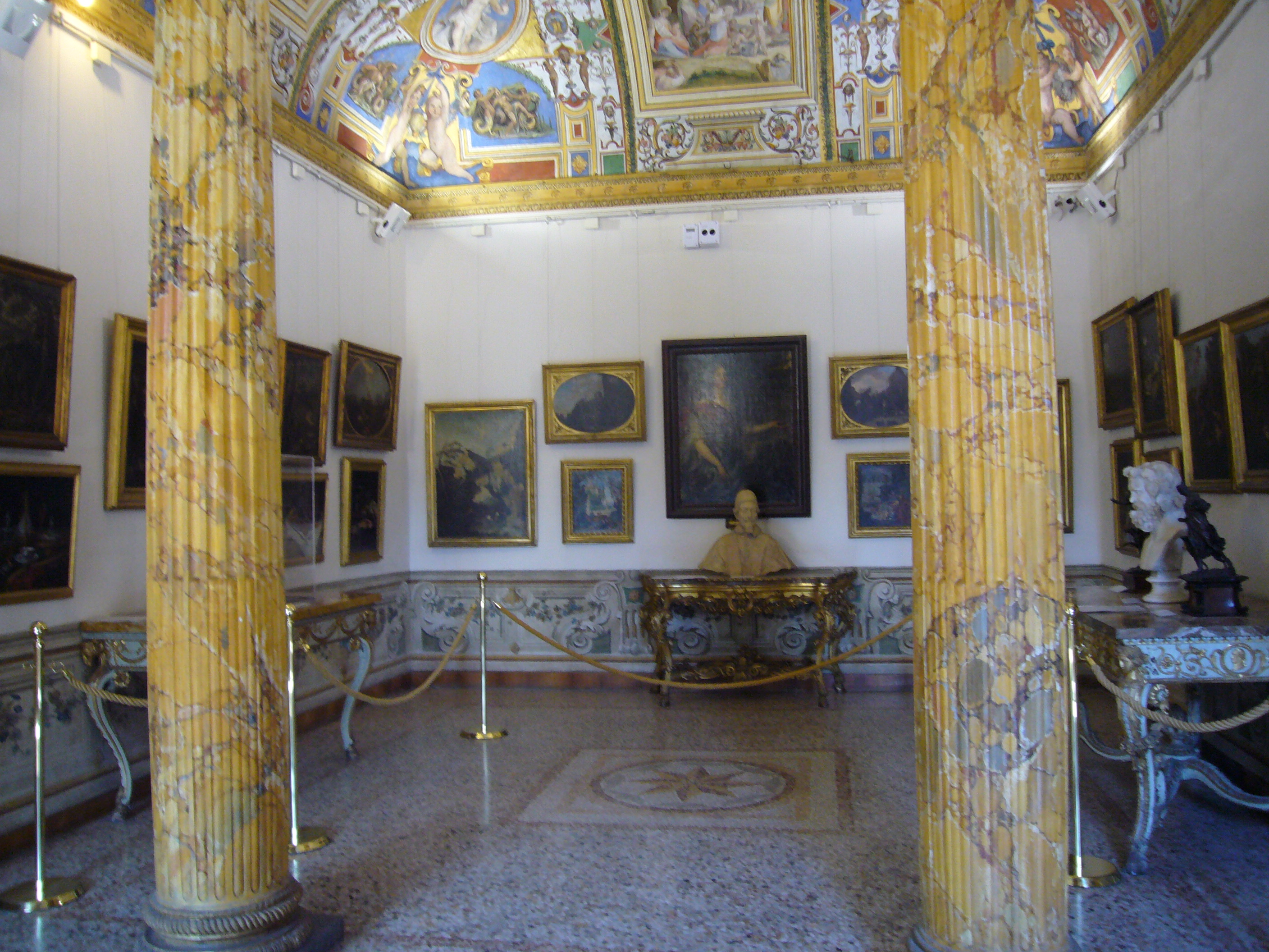 Roma, Palazzo Corsini alla Lungara, la stanza che fu la camera da letto di Cristina di Svezia